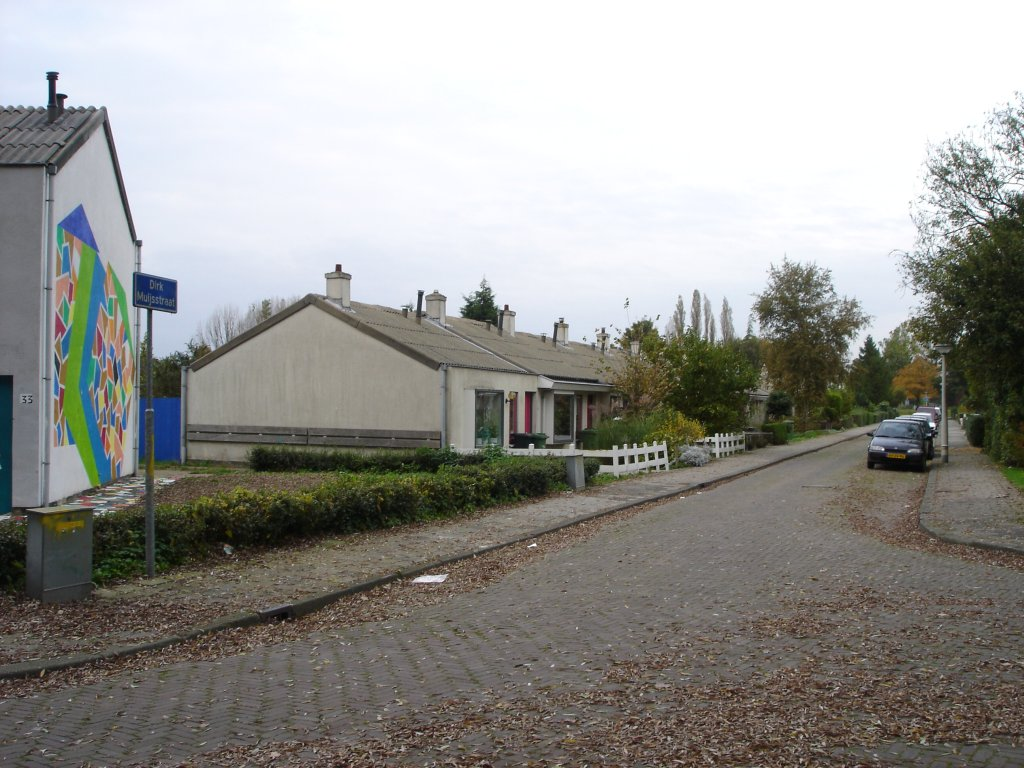 The Dirk Muijsstraat in the deelgemeente IJsselmonde, district Lombardijen/Smeetsland in Rotterdam